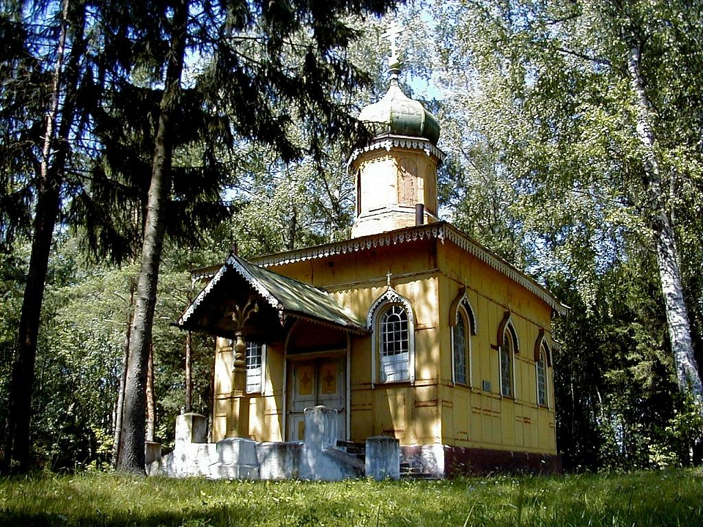 Jersikas pareizticīgo baznīca 2000-07-21